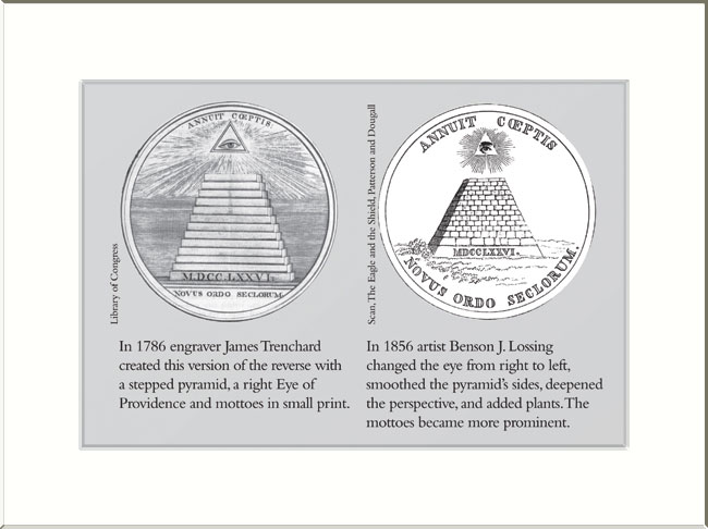 great-seal-5